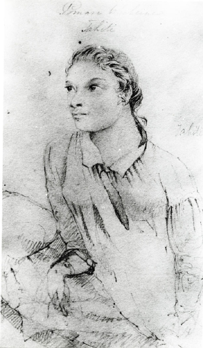 Aimata, était le nom de la jeune fille de Pomare II et de Teriitaria avant de devenir Pomare IV.